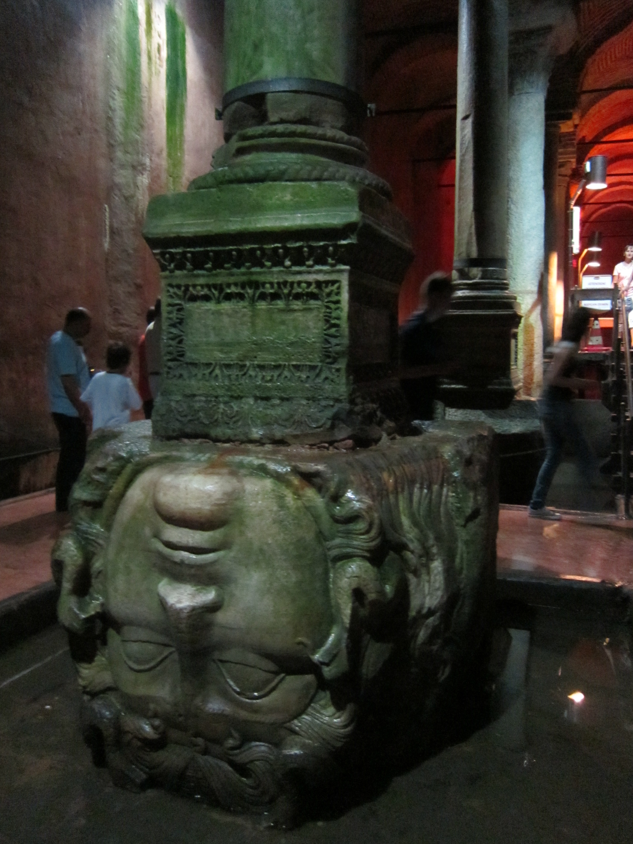 倒立的梅杜莎頭像被當作石柱底下的支撐